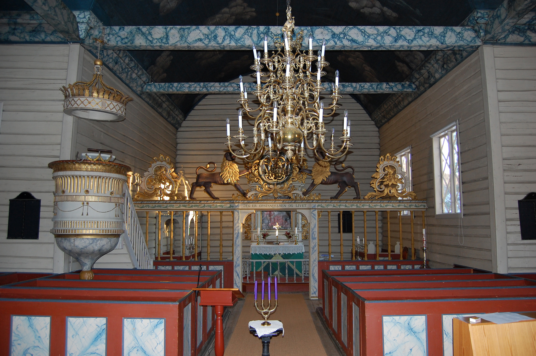 Interiør i Søndeled kirke. Foto: Hans Olav Stegarud, fra Kulturminnebilder.no.